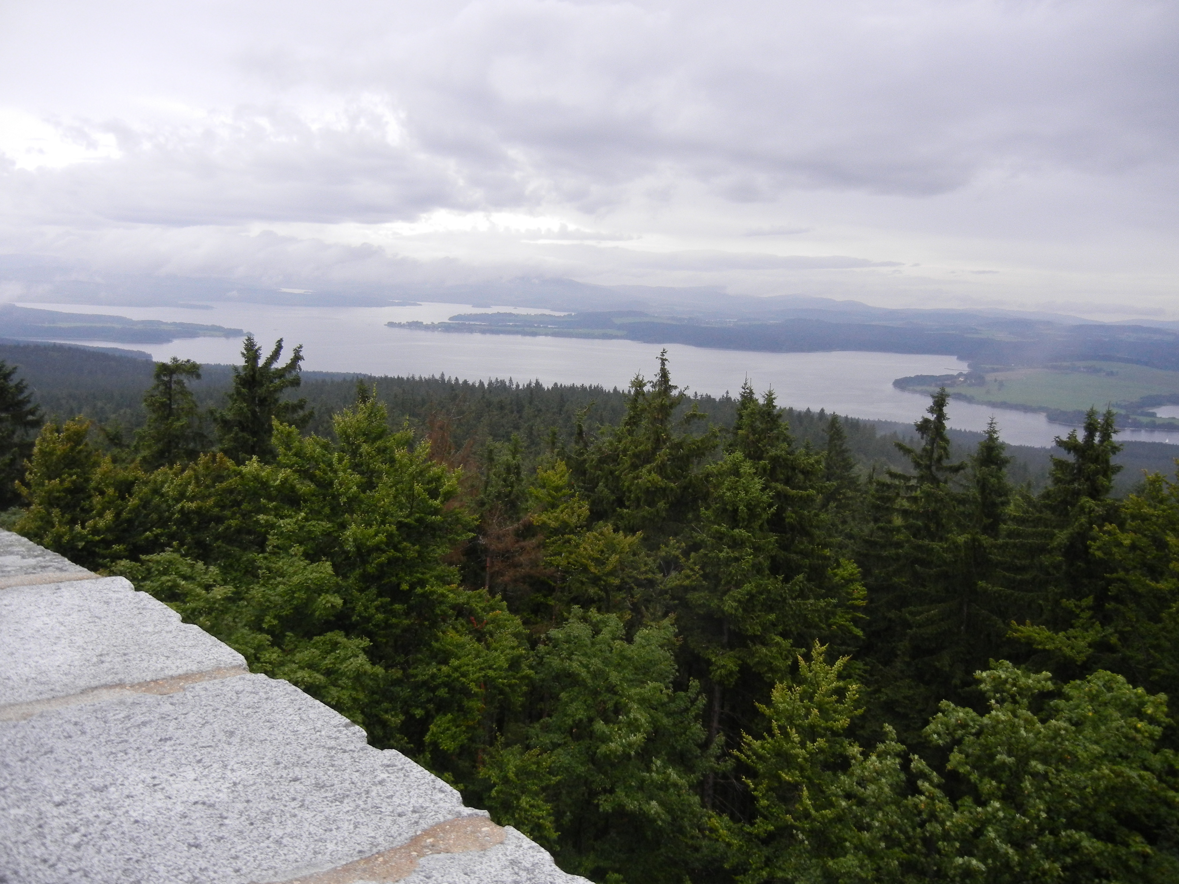 Hrad Vitkův kámen, zřícenina (Svatý Tomáš), v hraničním pásmu, Svatý Tomáš